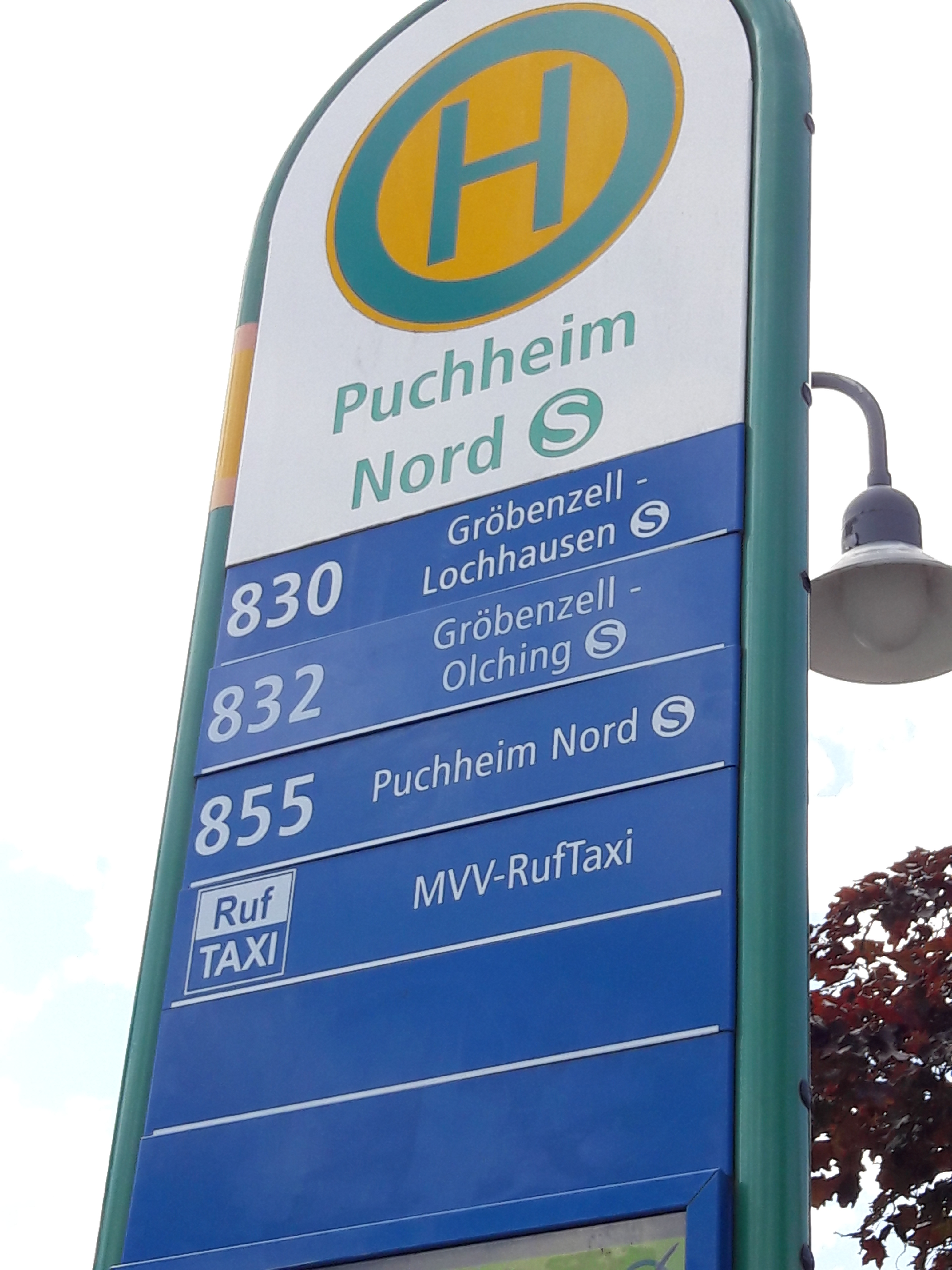 Haltestelle im MVV Puchheim.